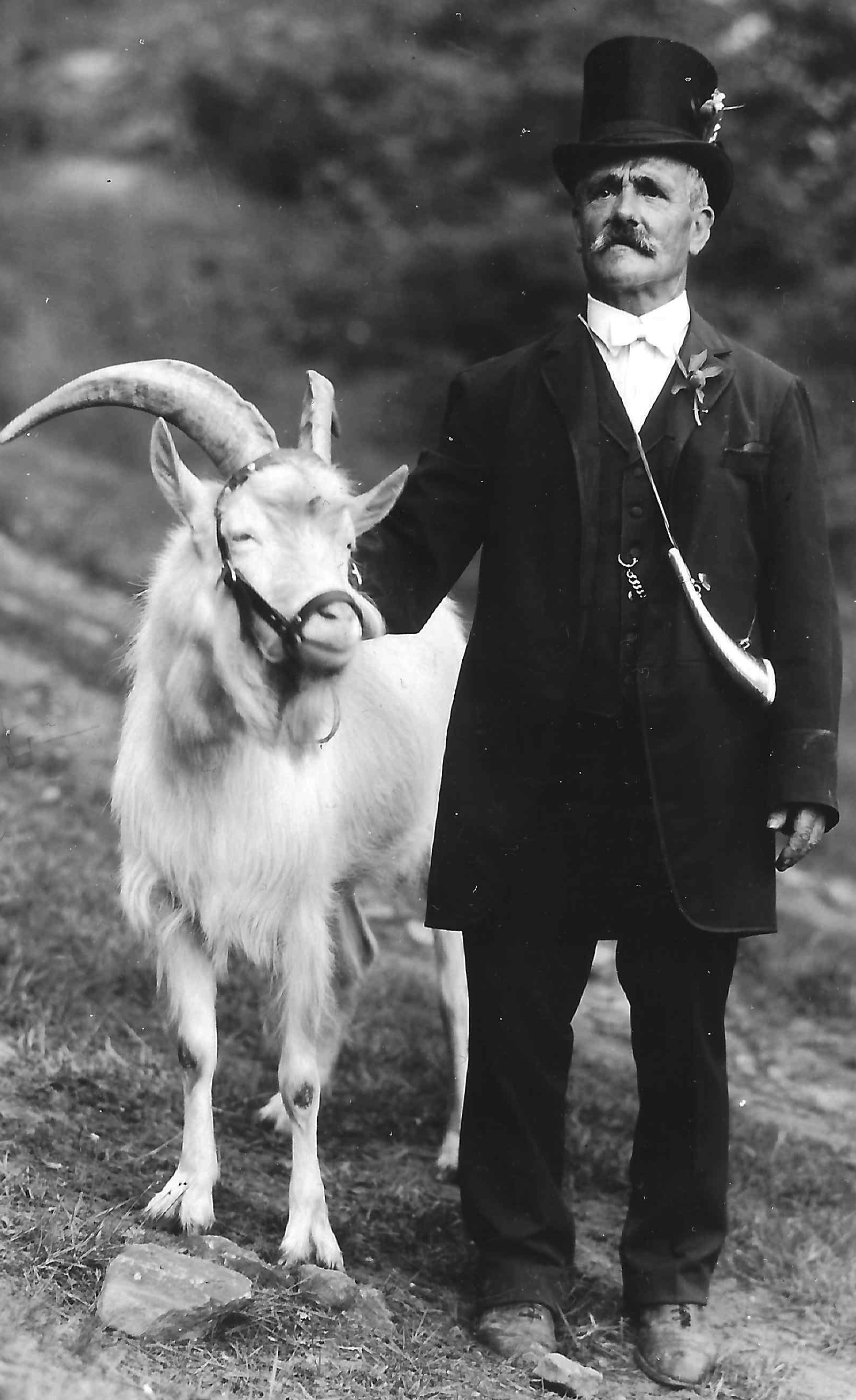 Johannes Eschenfelder, zweimaliger Steigerer des Tributbocks bei der Deidesheimer Geißbockversteigerung. Er war der Wirt der "Wirtschaft zum Königsgarten". Bild um 1905.